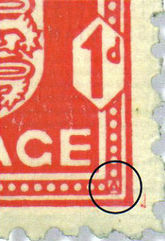 Vom Graveur N.V.L. Rybot eingefügter Buchstabe "A" in eine Jersey-Marke aus dem Jahr 1941.